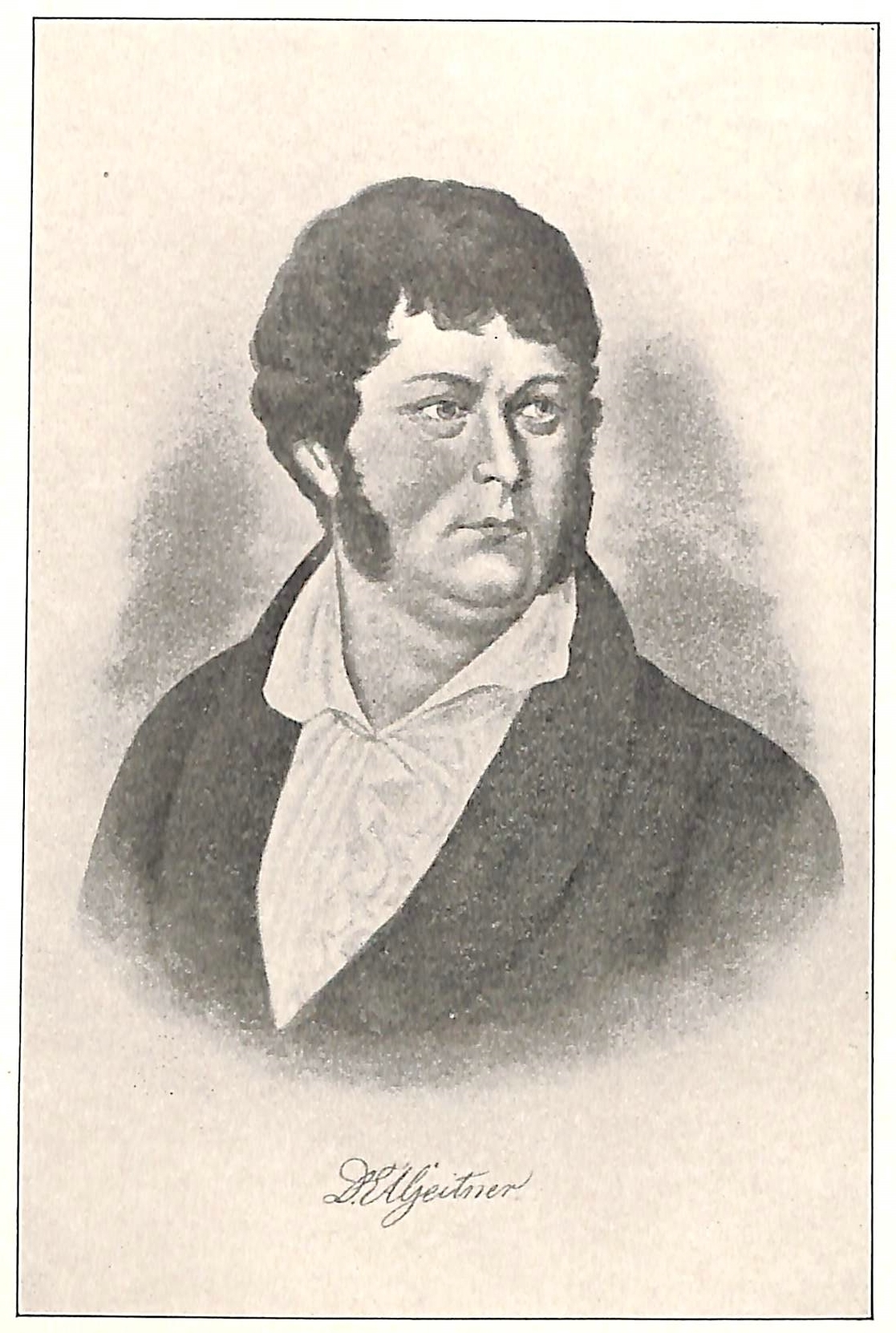 Portrait des Ernst August Geitner.